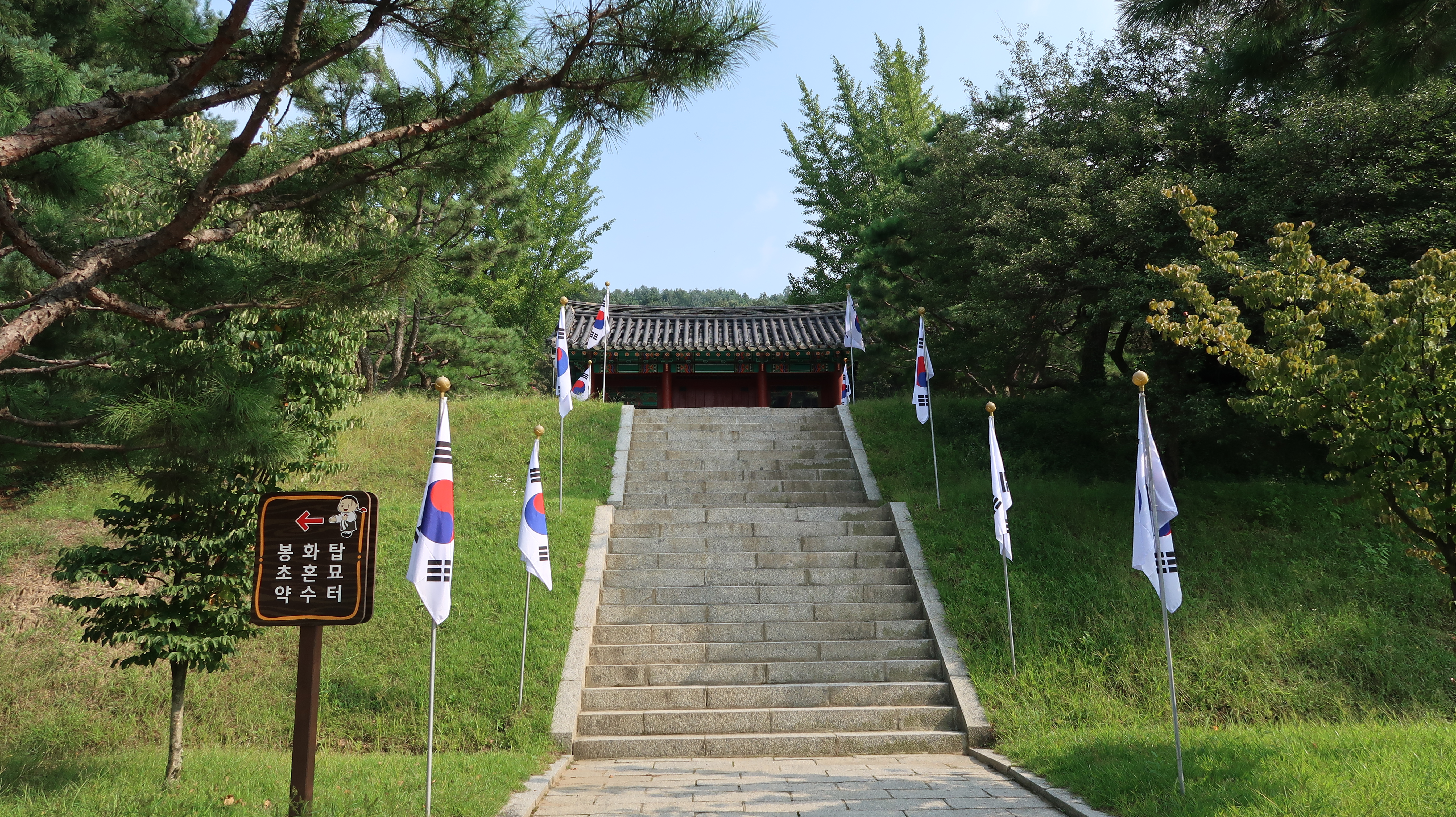 유관순열사-유적-The-Relics-of-Patriot-Yu-Gwansun